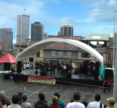 Tarima principal del XIII festival de la Chicha, la vida y la dicha. Barrio La Perseverancia, Bogotá, Colombia.